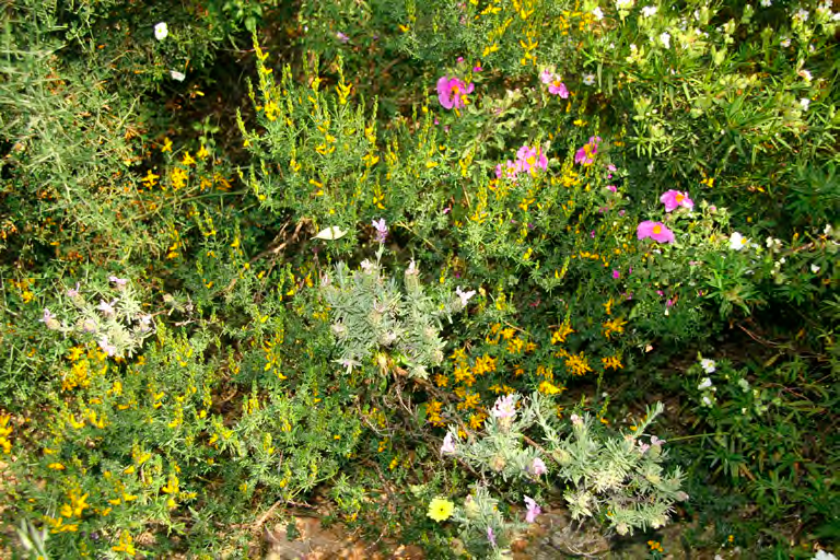 Habitat